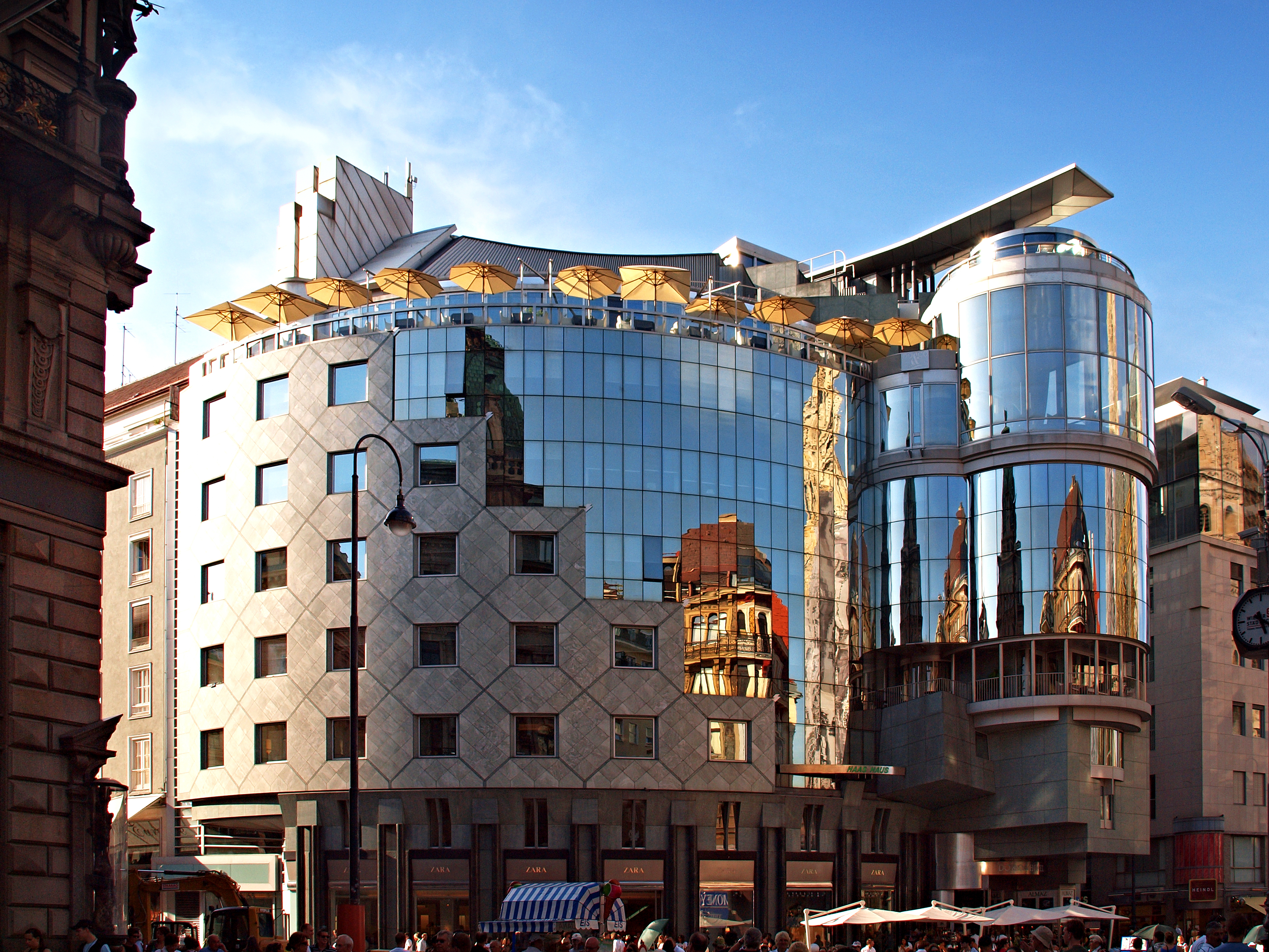 Das Haas-Haus am Wiener Stephansplatz